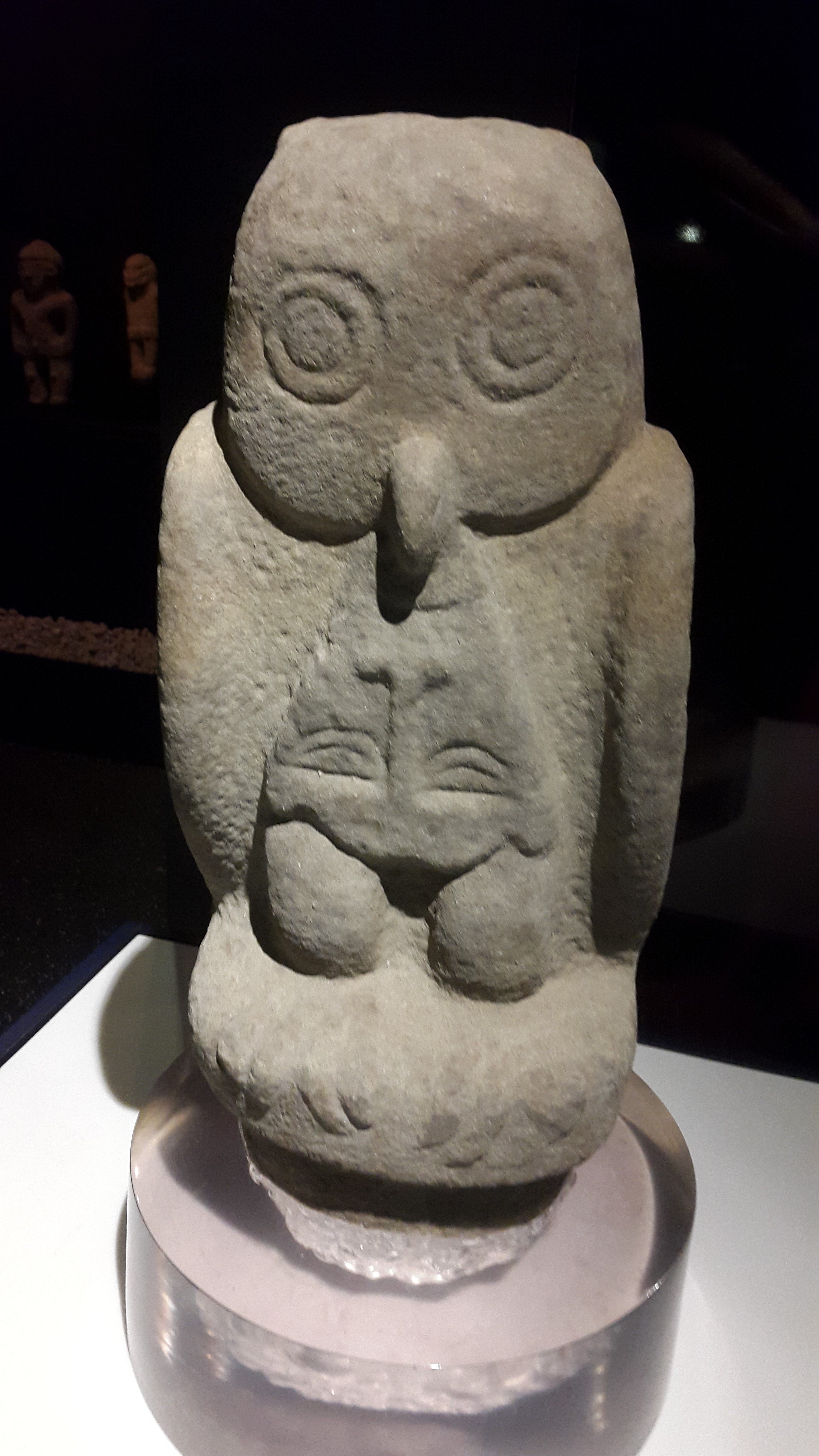 Gran búho de piedra de la cultura del Diquís, Costa Rica.